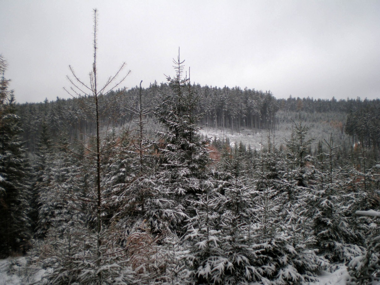 Vrch Březák (785 m) na Třítrubeckým údolím